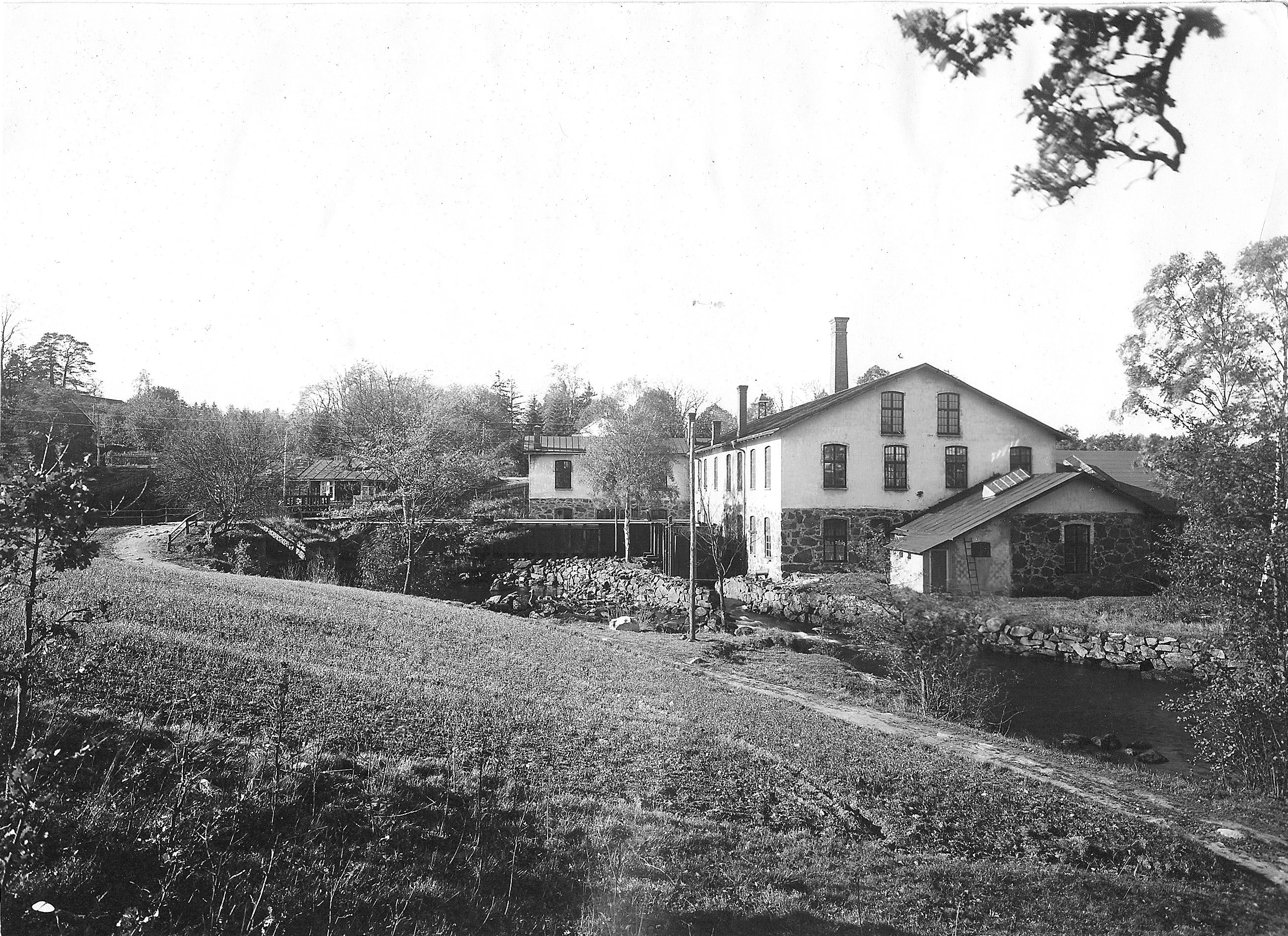 Stensholms fabrik 1925